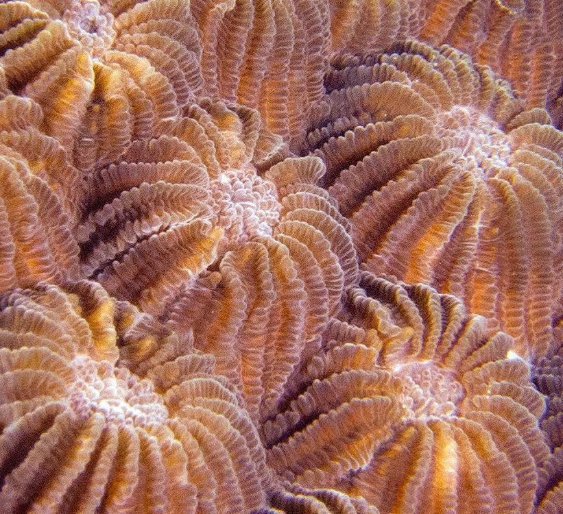 Diploastrea heliopora, detalle de coralitos. Koh Phangan, Tailandia